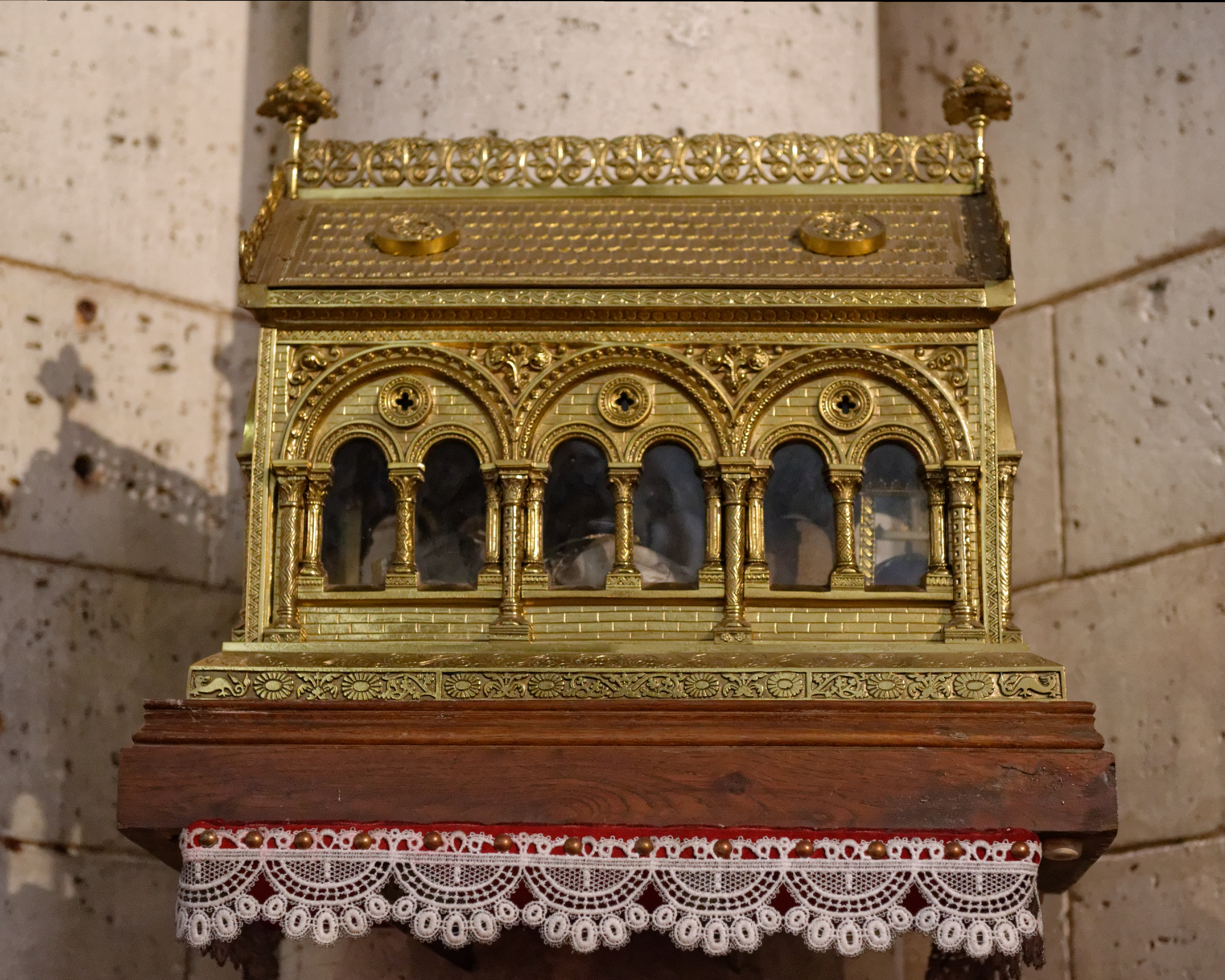 Reliquaire de saint Sicaire, l'un des saints innocents, dans l'église abbatiale Saint-Pierre de Brantôme.